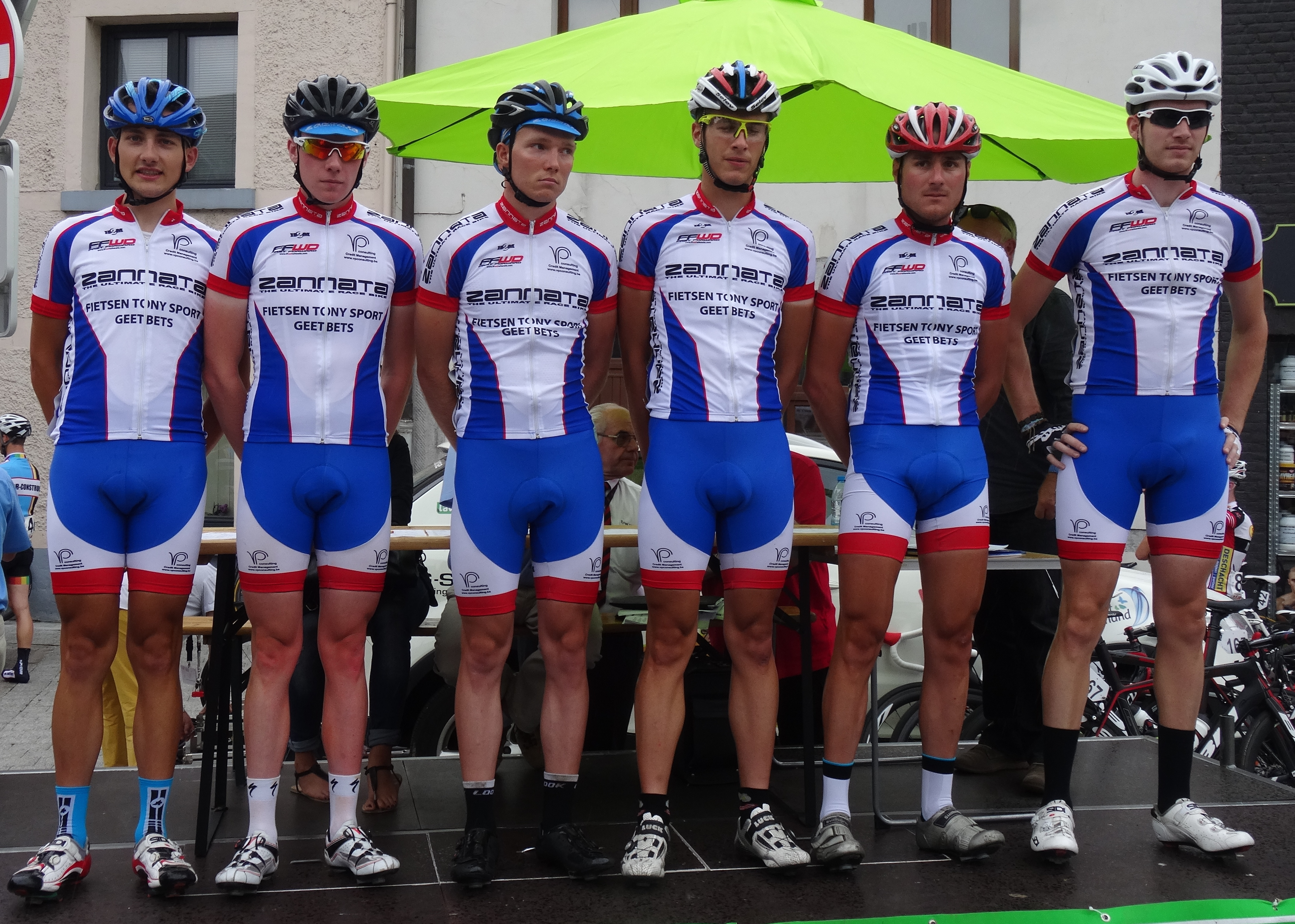 Reportage photographique réalisé le mercredi 6 août à l'occasion du départ de la première étape du Tour de la province de Namur 2014 à Jambes (Namur), Belgique.